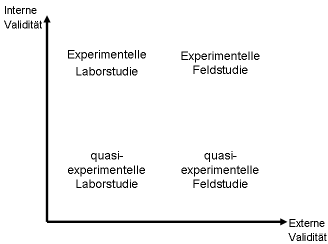 Experimente